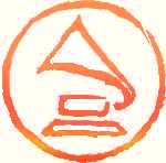 Grammy silueta